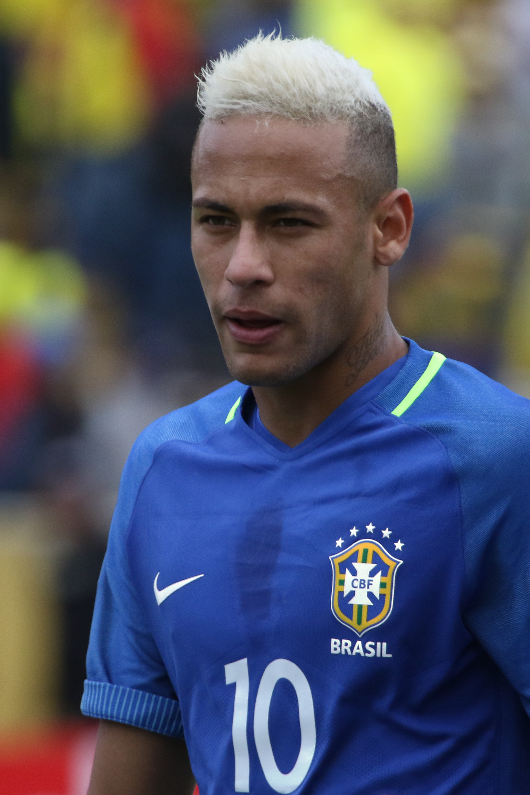 Quito, 01 sep (Andes).- La selección de Brasil se impuso la tarde de este jueves 3-0 ante Ecuador, en el estadio Olímpico Atahualpa, en el cotejo correspondiente a la fecha 7 de las Eliminatorias al Mundial de Rusia 2018. ANDES/Micaela Ayala V.